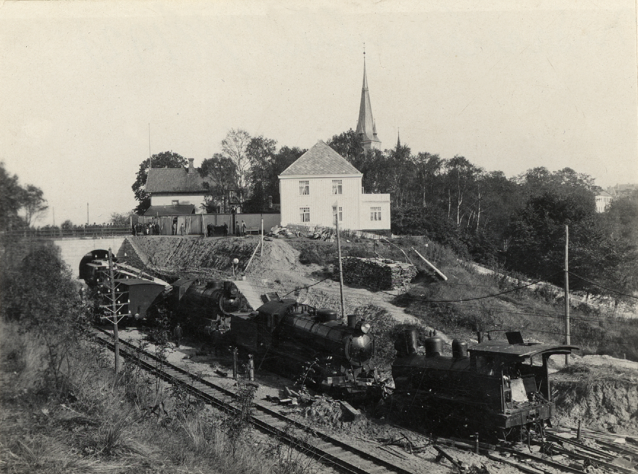 Format: Fotopositiv Dato / Date: 18. september 1921 Fotograf / Photographer: Ukjent, mulig Alf Schrøder (1880 - 1951) Sted / Place: Trondheim Wikipedia: Nidareid-ulykken WikiStrinda: Nidareid-ulykken Eier / Owner Institution: Trondheim byarkiv, The Municipal Archives of Trondheim Arkivreferanse / Archive reference: Tor.H45.F9563 Merknad: Togulykke ved Nidareidtunellen den 18. september 1921. I forbindelse med Dovrebanens høytidelige åpning i Trondheim 17. september hadde det kommet et stort antall prominente gjester til byen. Da en del av gjestene skulle reise tilbake til hovedstaden om kvelden den 18. september, kolliderte deres ekstratog med et annet tog like sør for Nidareidtunnelen. Det andre toget skulle ventet på Marienborg, men føreren hadde ikke oppfattet denne ordren. Seks personer omkom i ulykken og 13 ble skadd. (Trondheim byleksikon, 2008)